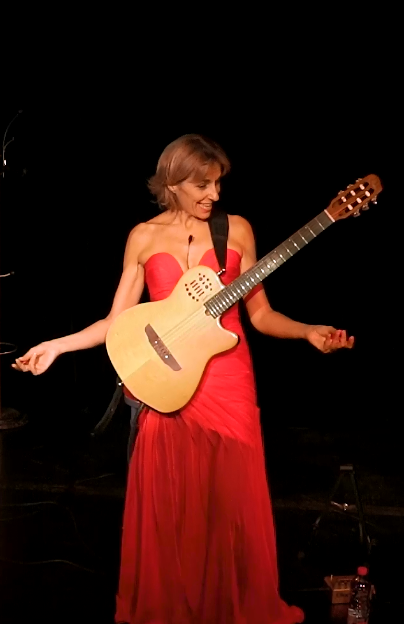 Spectacle 2018